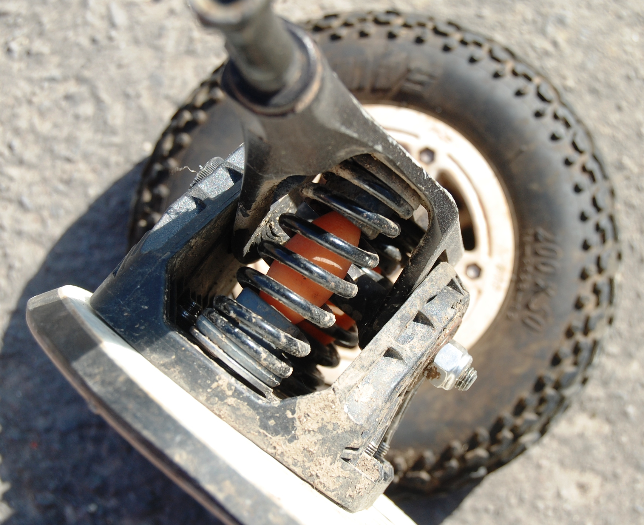 Muelles y eggs de channel truck